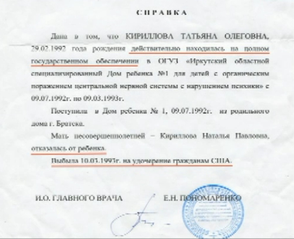 Справка из детского дома Иркутска о пребывании Татьяны Кирилловы (Jessica Long) с 09.07.1992 по 09.03.1993